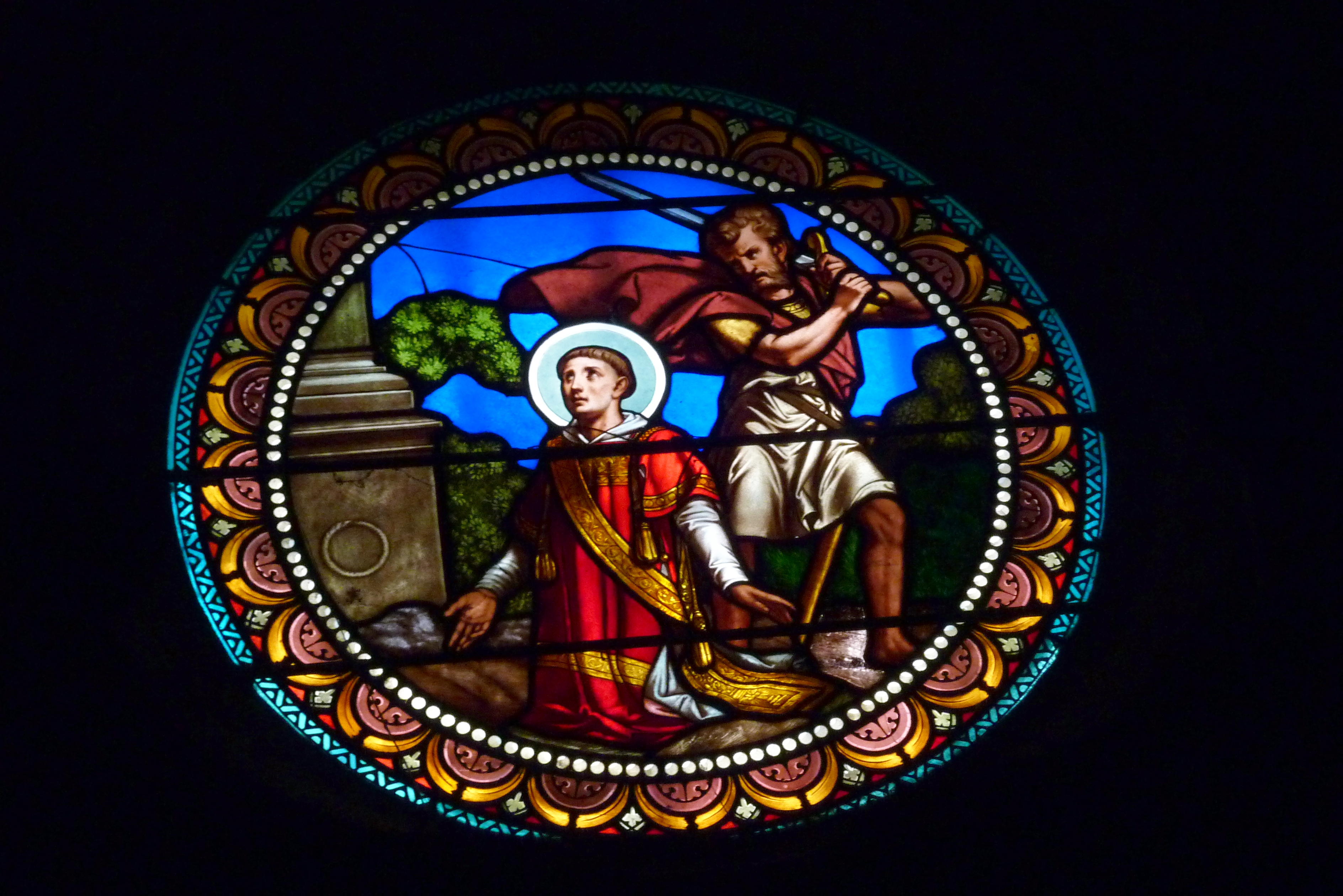 Bleiglasfenster in der Kirche Saint-Baudile in Noves, Darstellung: hl. Baudilius